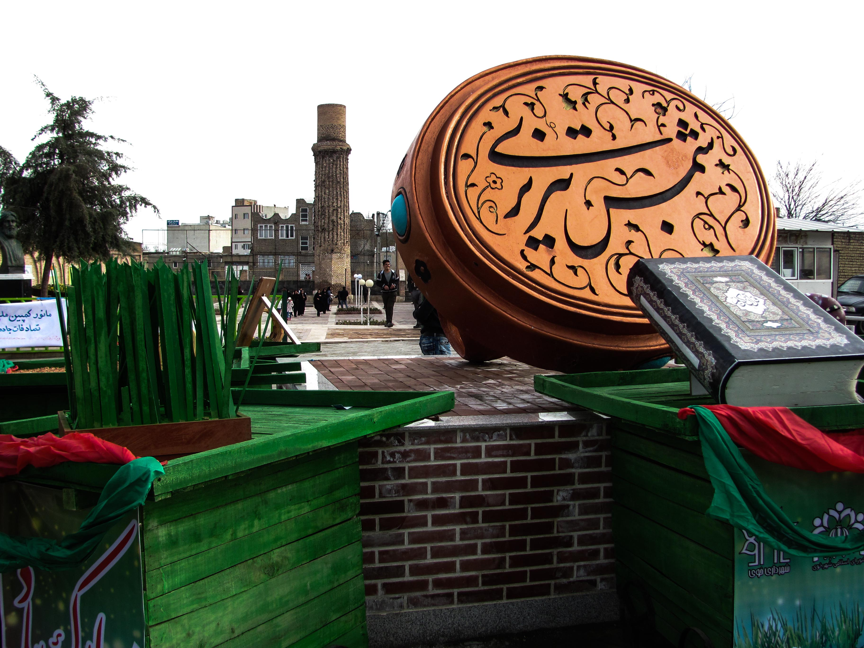 مناره شمس تبریزی دینبلی